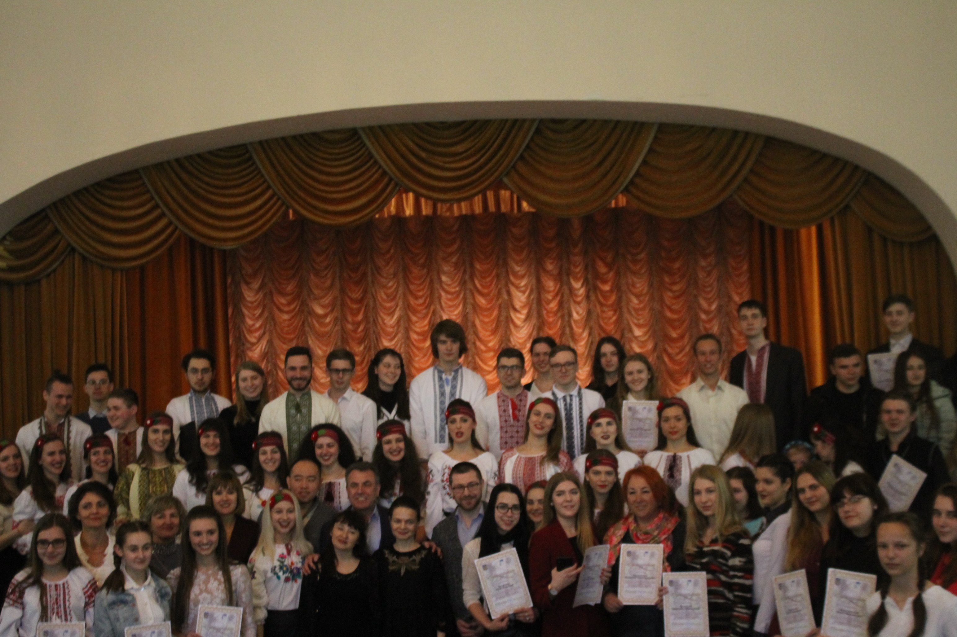 Хор студентів педагогічного університету ім. Драгоманова в Бердичеві